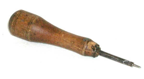 reikärauta